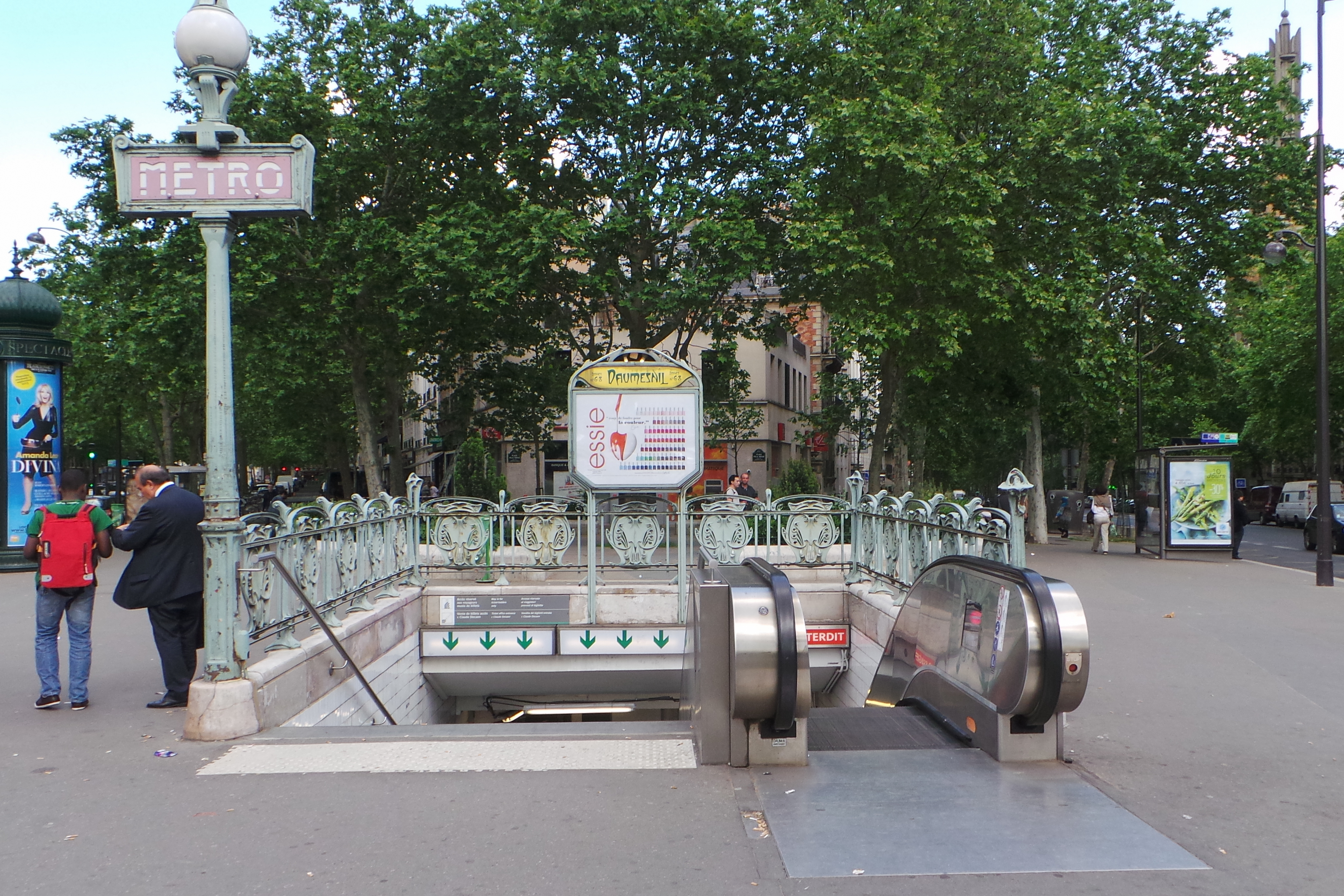 Station de métro Daumesnil, lignes 6 et 8 du métro de Paris - Paris, France